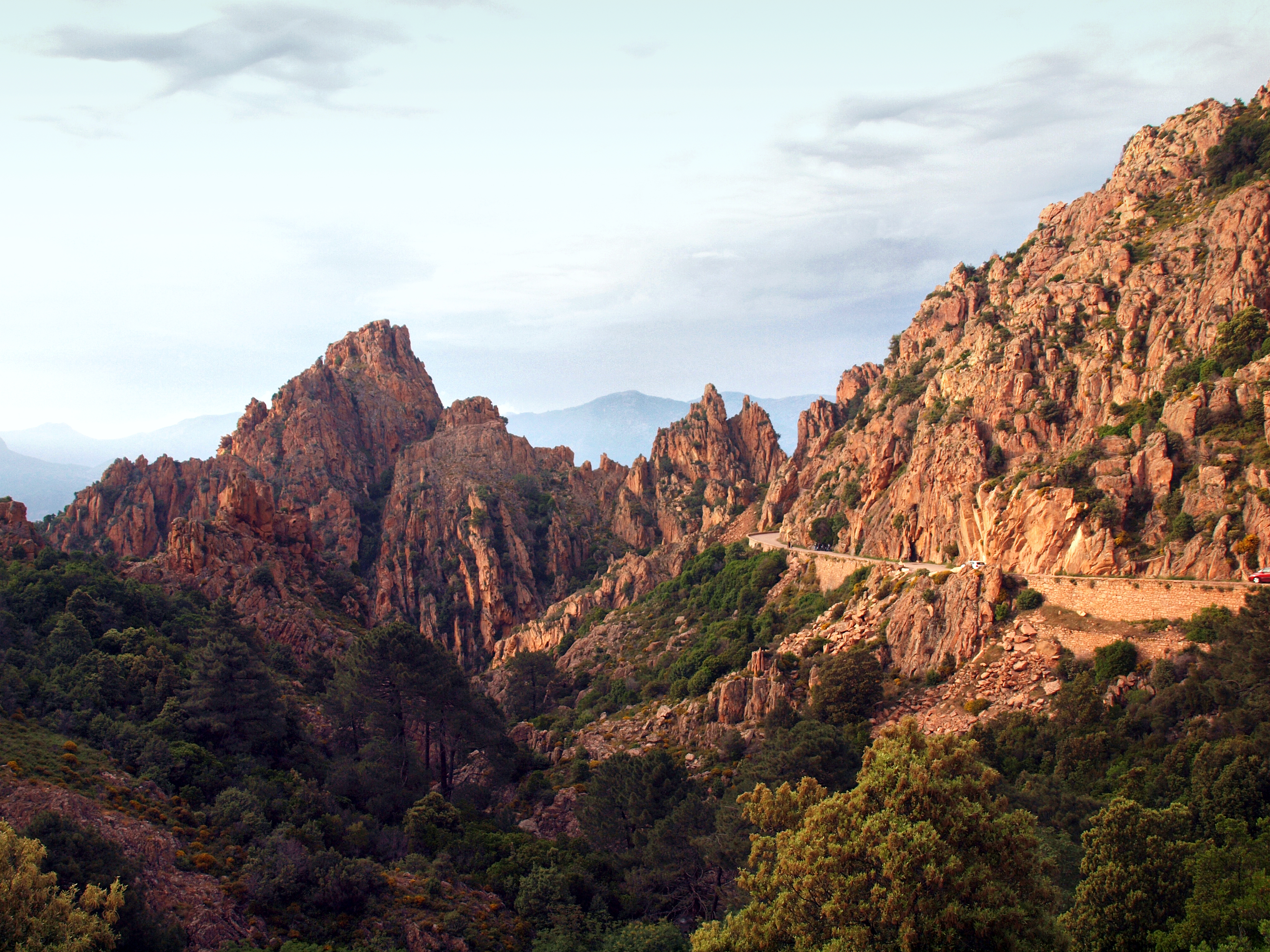 Piana, Ouest Corse (Corse) - Le vallon du Dardo dans la traversée des Calanche